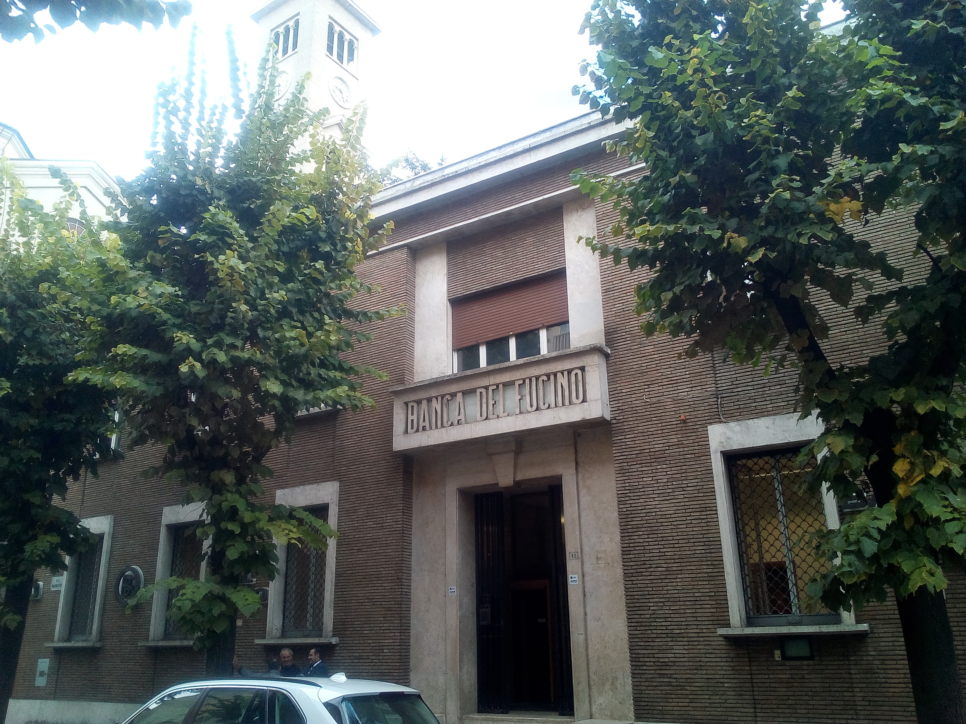 Sede di Avezzano della Banca del Fucino